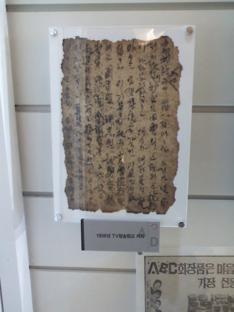 제가 직접 찍은 사진입니다.